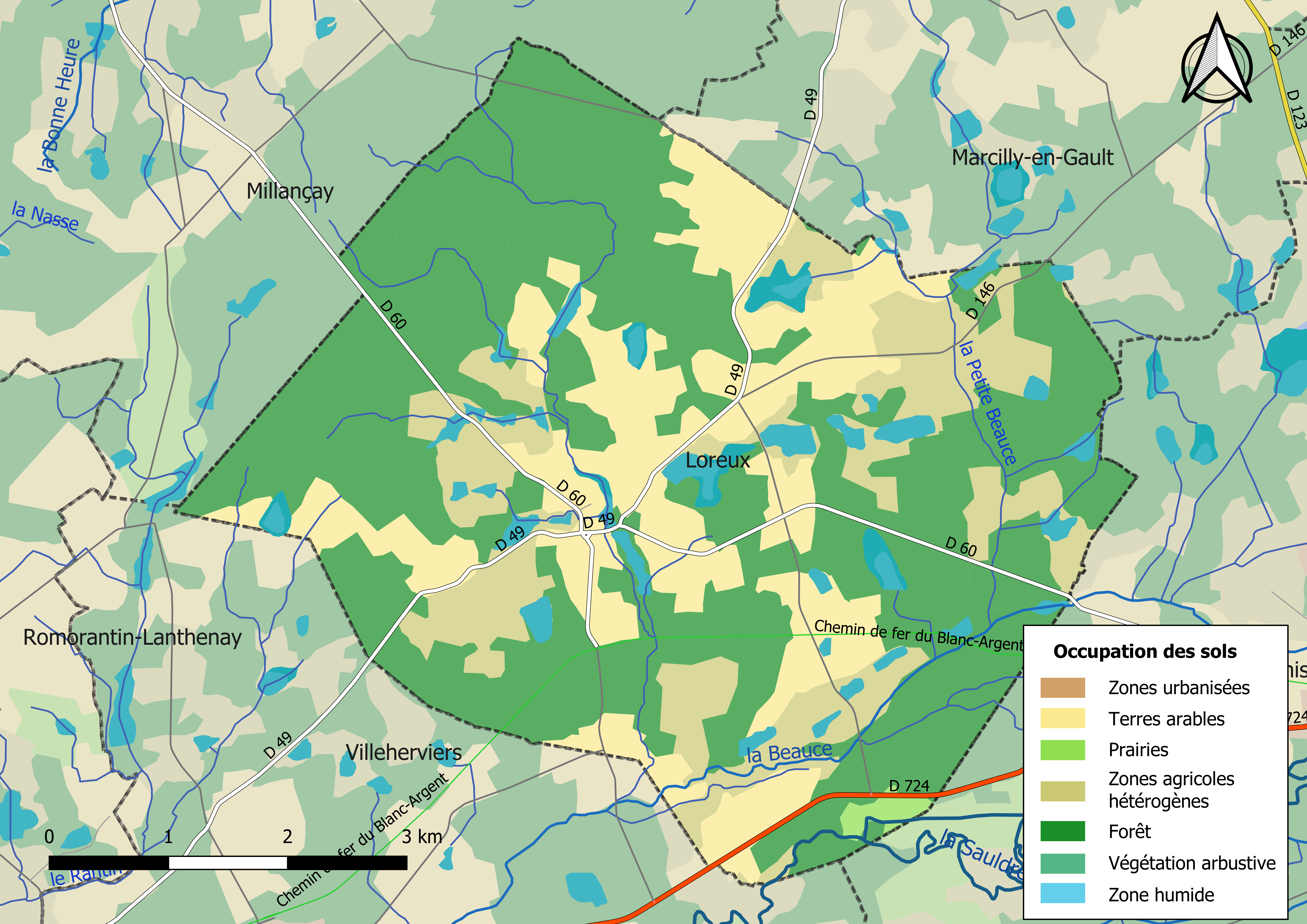 Carte des infrastructures et de l’occupation des sols en 2018 de la commune de Loreux (France).